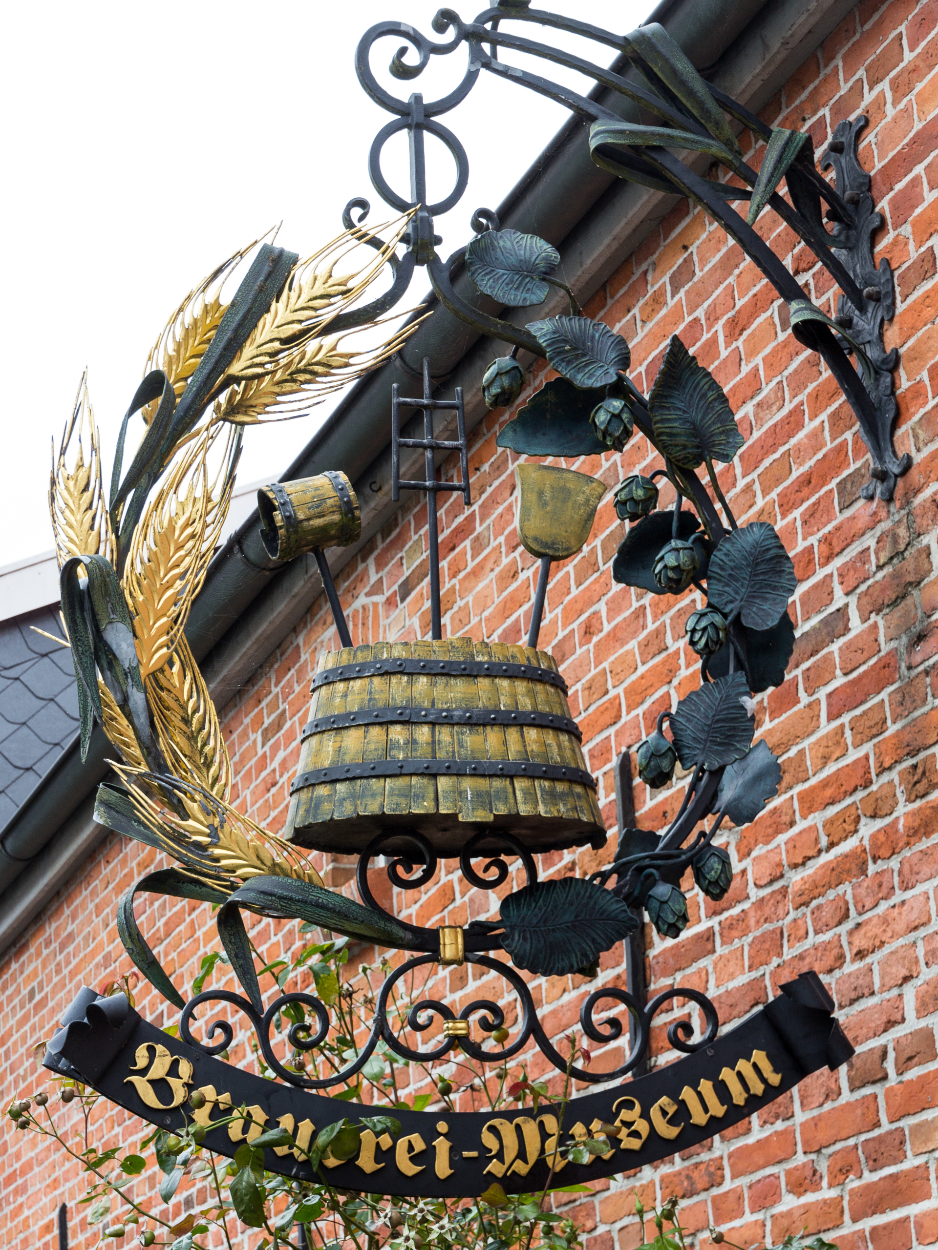 Brauerrei-Museum (Jever)